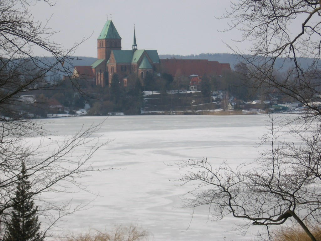 Der Ratzeburger Dom im Winter